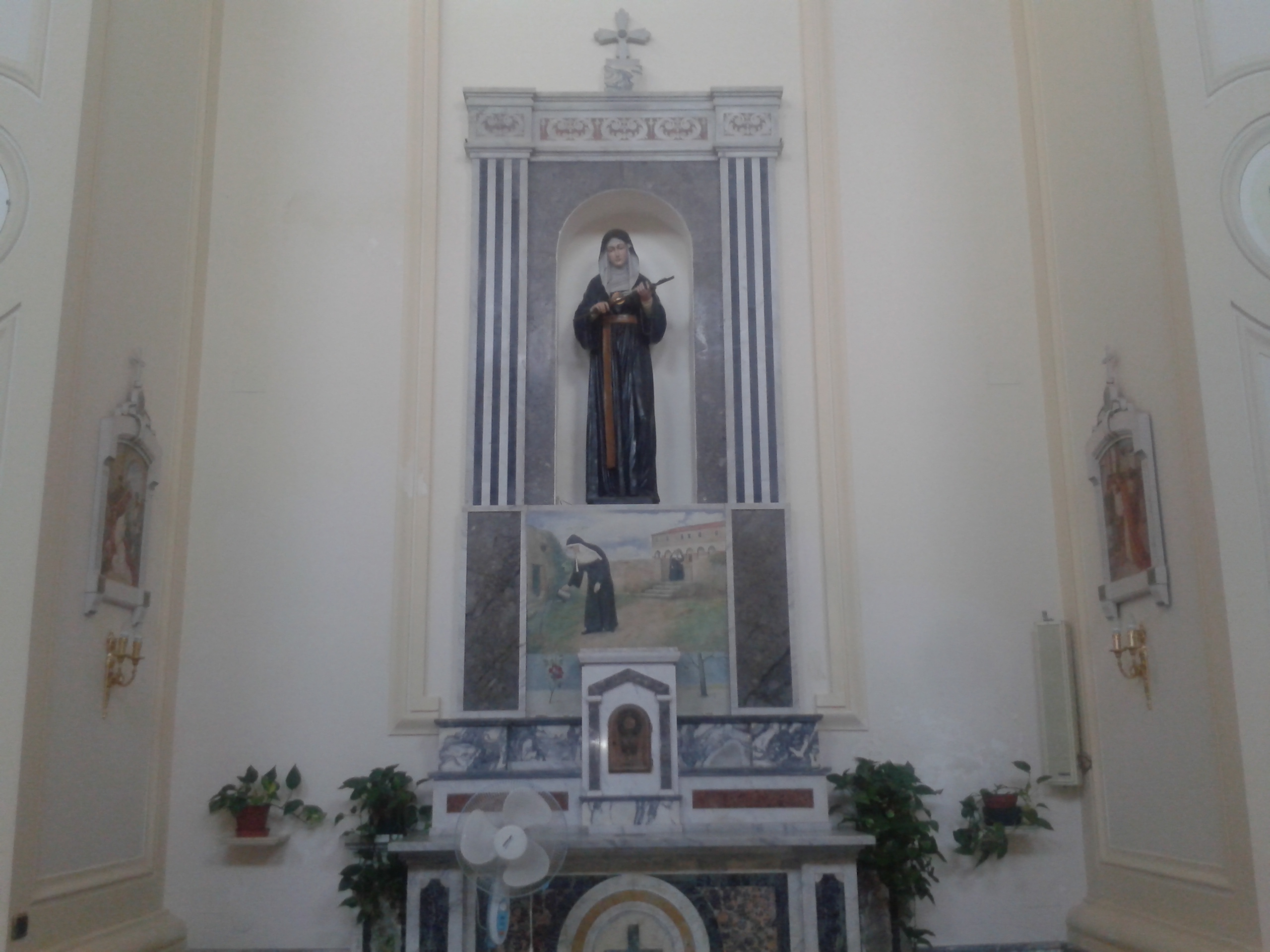 Santa Rita chiesa del Soccorso di Palmi